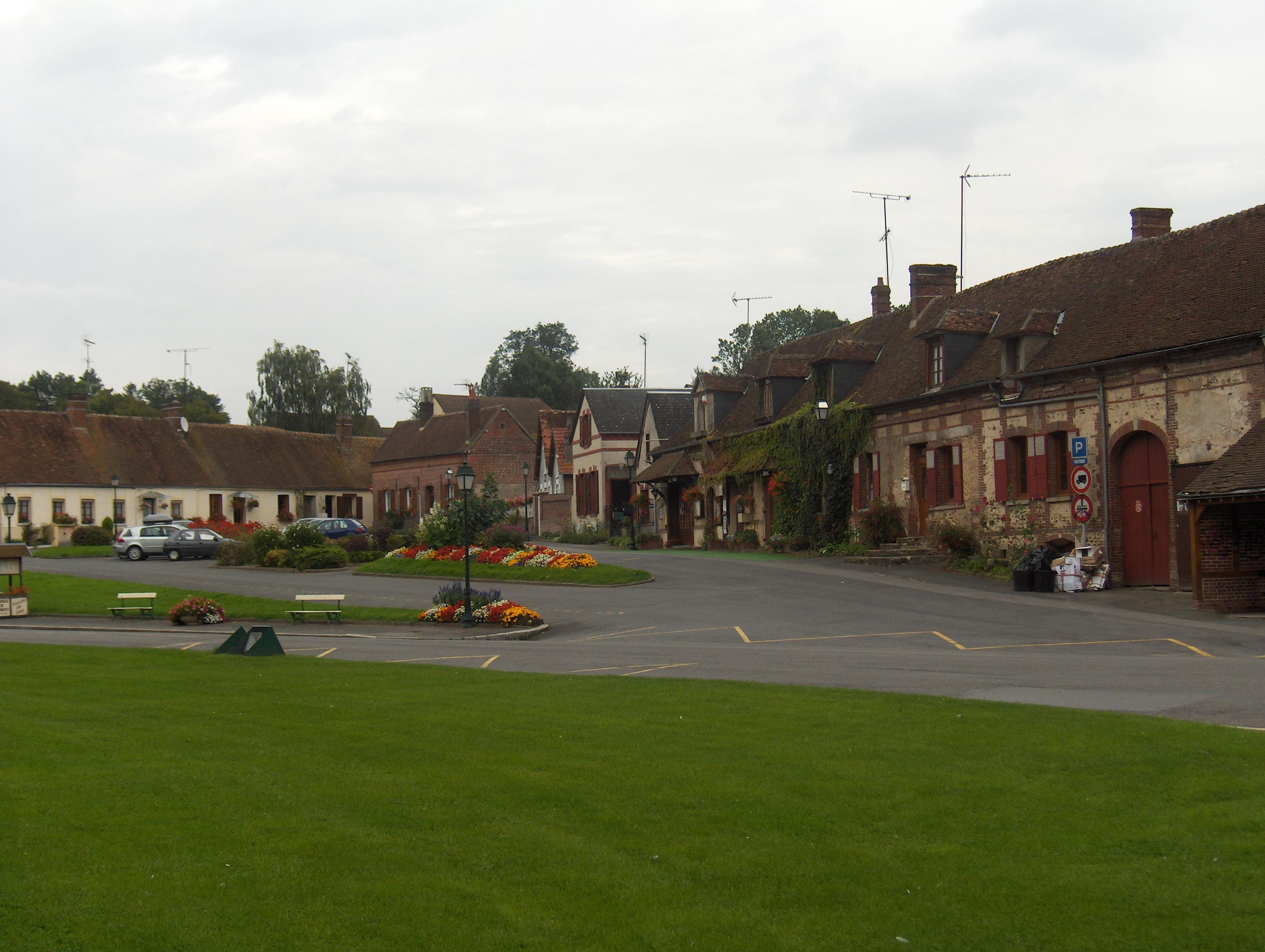 Vue du centre de Saint-Germer-de-Fly dans l'Oise (Picardie) depuis l'esplanade de l'abbaye